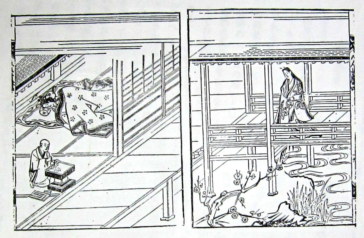 井原西鶴「好色五人女」挿絵「吉三郎の部屋を訪れるお七」の場面